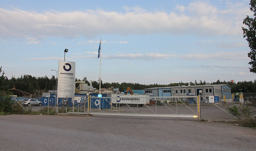 Kuusakoski Oy:n kierrytyslaitos Vantaan Kiilan kaupunginosassa. Huom: Muista säilyttää viittaus kuvaajaan, mikäli käytät kuvaa.